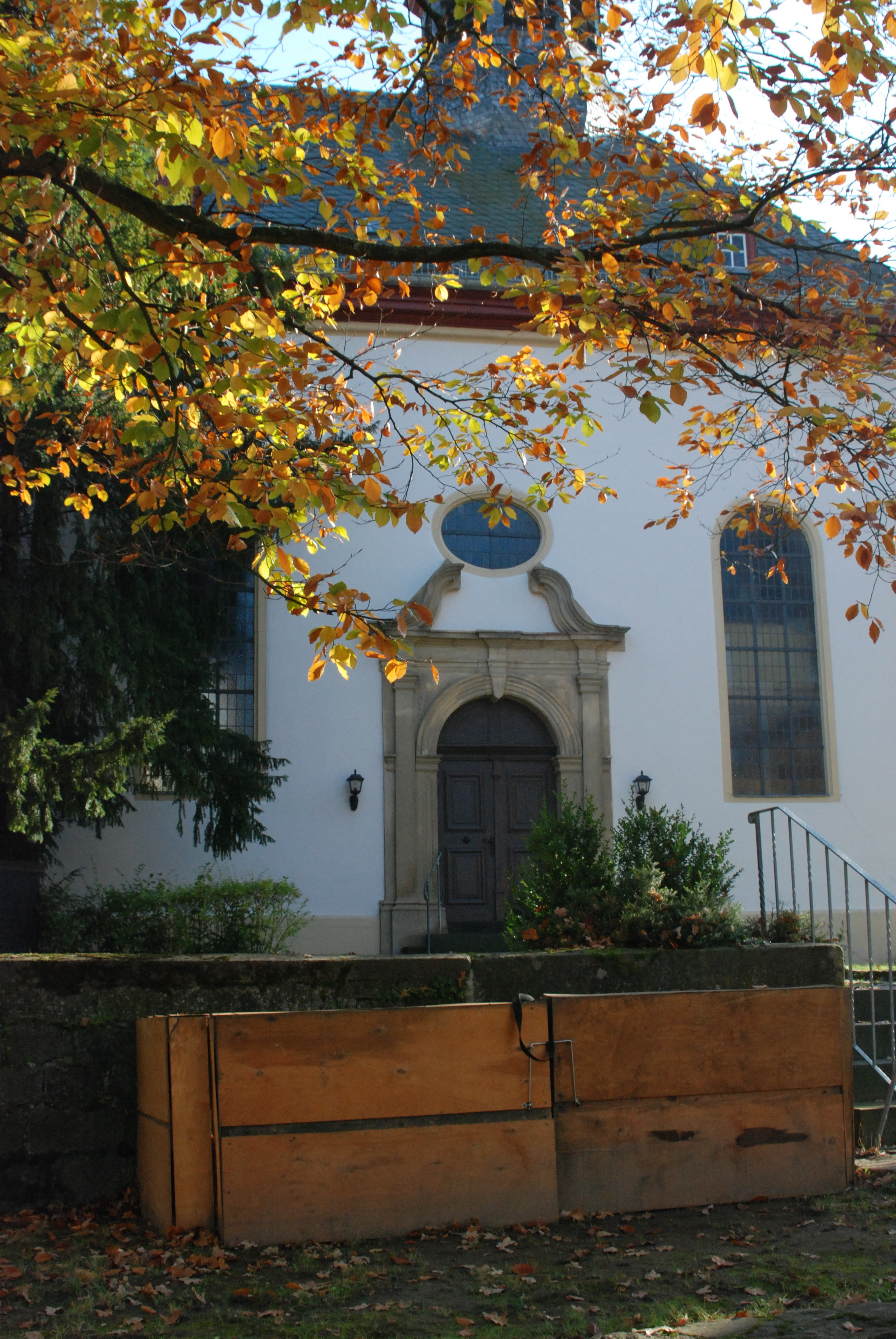 Rommersheim, Gemeinde Wörrstadt; Blick auf evangelische Kirche (1733-51) von der Kegelbahnstraße, Rommersheim